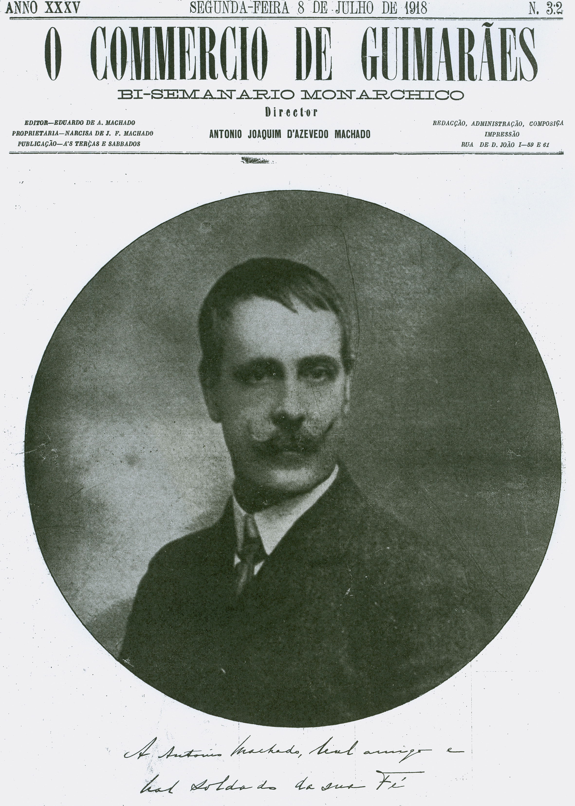 O Commercio do Porto